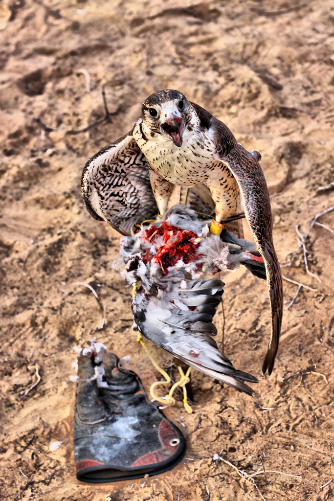 نا على المقنـاص قلبـي يرفـي فترة ونرجع يم اهلنـا منـا كيـف بديـار لفـروق الحبـارى تلفـى جنوب من حزم الجلاميد وطريـف الطير هو غايـة غرامـي وشفـي اقـدره تقديـر الاجـواد للضيـف من كبر قدره حاملـه فـوق كفـي وارعاه تسع شهور بالقيظ والصيف ودهلـه لاشفـت ريشـه مصفـي على الدعو واخفف النسر تخفيـف نقلـه يشرفنـي وشوفـه يكفـي عن شوف ناس ما تعرف المعاريف لاشفت لـي نـو بروقـه ترفـي نويت اجهـز موتـري للتكاليـف القيظ كلـه جالـس(ن) ومتعفـي وبرد المكيف نشف الـدم تنشيـف متى سمـوم القيـظ عنـا تقفـي وسهيل قبل يعمد الفجر قد شيـف والنـار يصلـح شبهـا للتـدفـي والبرد نوجس من نسيمه هفاهيف وقمنـا لعزبتنـا نشيـل ونضفـي ونكمل الناقص ونمـلا المطاريـف واللي نشيل مـن اللـوازم مكفـي ومكتفين العفش بالحبـل تكتيـف ويمكن اليا جينـا البقالـة نوفـي حاجات نشريها كمالـة مصاريـف والصبح من حزم ابرقيـه مقفـي صوب المعظم والهضاب المقاييـف بديار جعل اشجارهـا مـا تجفـي تعلهـا غـر المـزون المراديـف في رفقة اللي نارهـم مـا تطفـي على الشرف والجود ربع مواليـف مجلاس طلقين الشـوارب بصفـي على الدلال اللي بهن ساخن الكيف خويهم ما اوجـس كـلامٍ يحفـي غير المزوح الطيبـة والسواليـف عقال وزن عقولهـم مـا يخفـي ولاهم على الفاضي خفاف وملاقيف